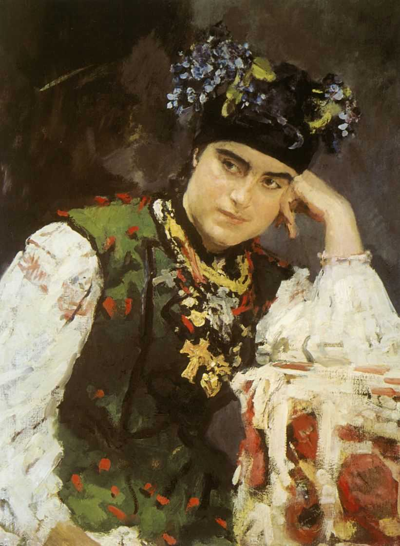 Портрет С.М. Драгомировой Государственный музей изобразительных искусств Республики Татарстан, Казань